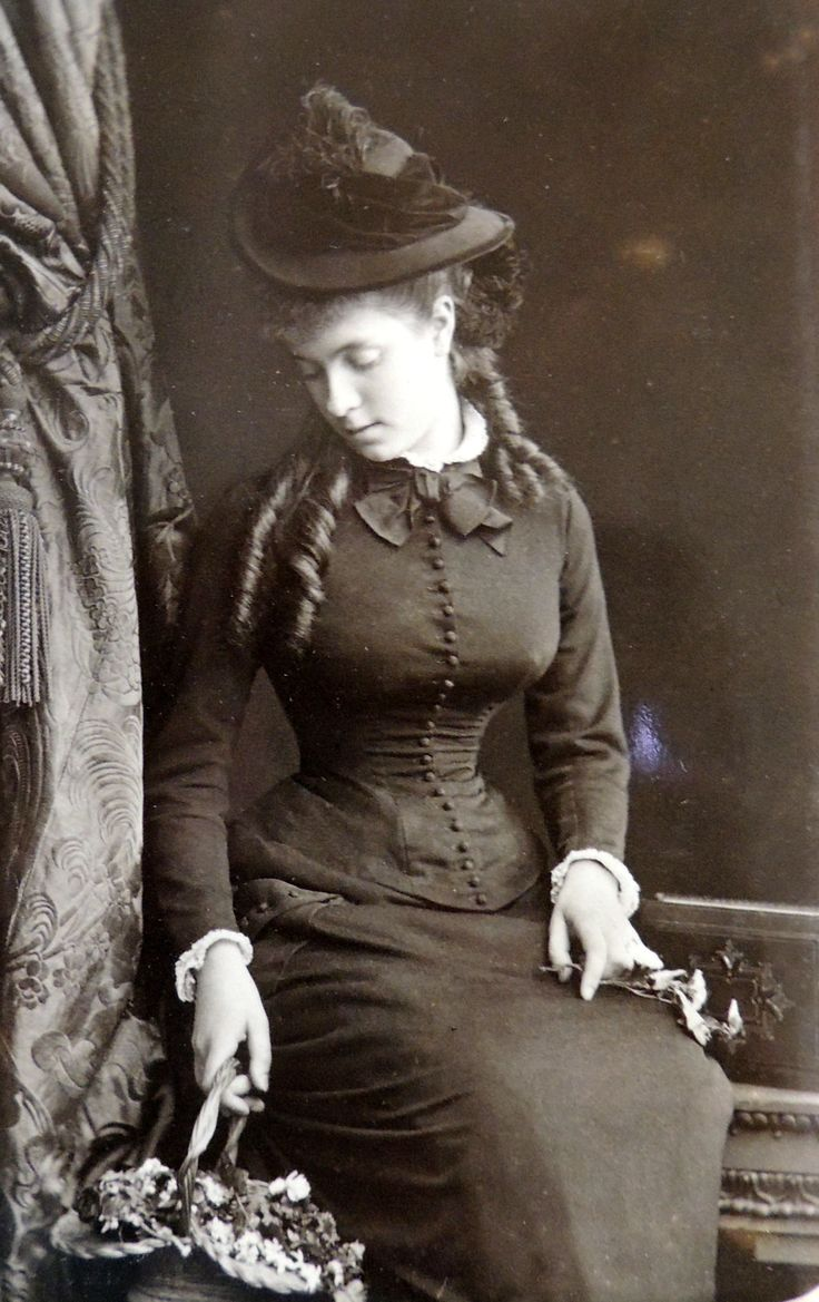 Александра Петровна Охотникова, урождённая княжна Трубецкая (1857—1949)